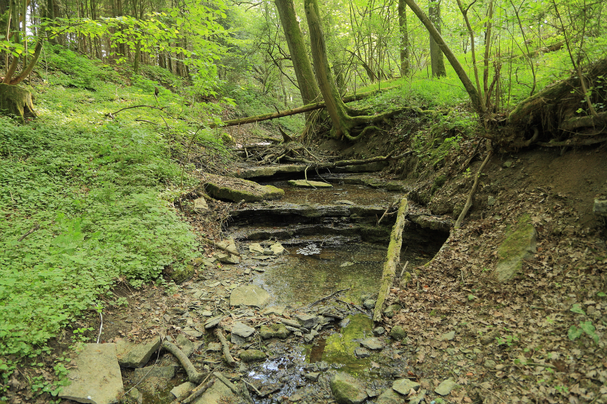 Geotop-Nummer: 572A005 Eckental Erlangen-Höchstadt 6433 Lauf a.d.Pegnitz R: 4447514 H: 5495599 Gesteine des Lias Delta (Amaltheenton) und Epsilon/Fossilreichtum/„Belemnitenschlachtfeld""